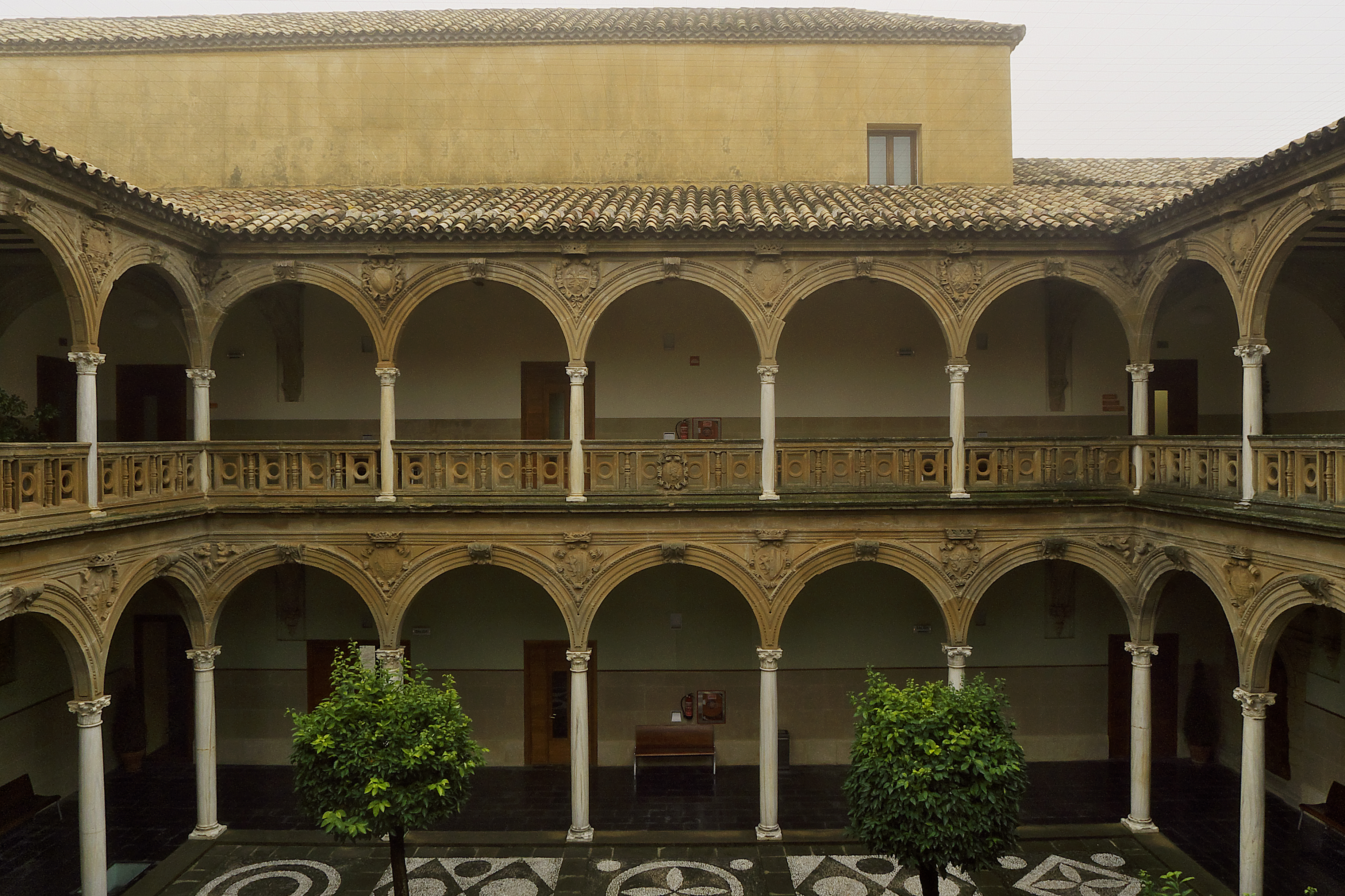 María de Benavides y Sandoval, marquesa de Villareal, modifica el Palacio de Jabalquinto con este patio renacentista (1599-1600), tal vez cumpliendo el deseo del I Marqués de Jabalquinto, Manuel III de Benavides y Bazán.